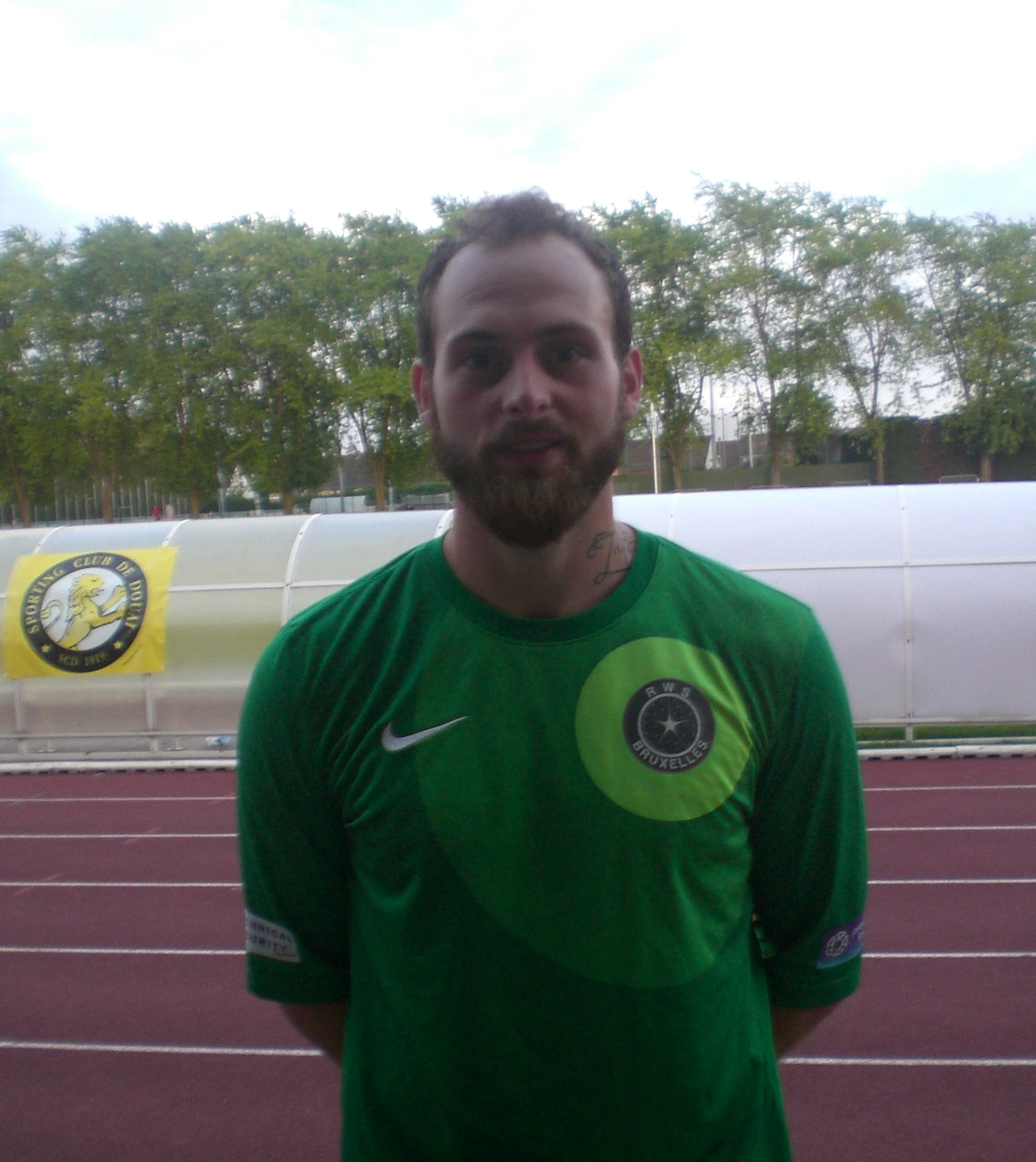 Mike Vanhamel à la fin du match amical RC Lens - RWS Bruxelles, le 24 juillet 2015, au Stade Démény de Douai.